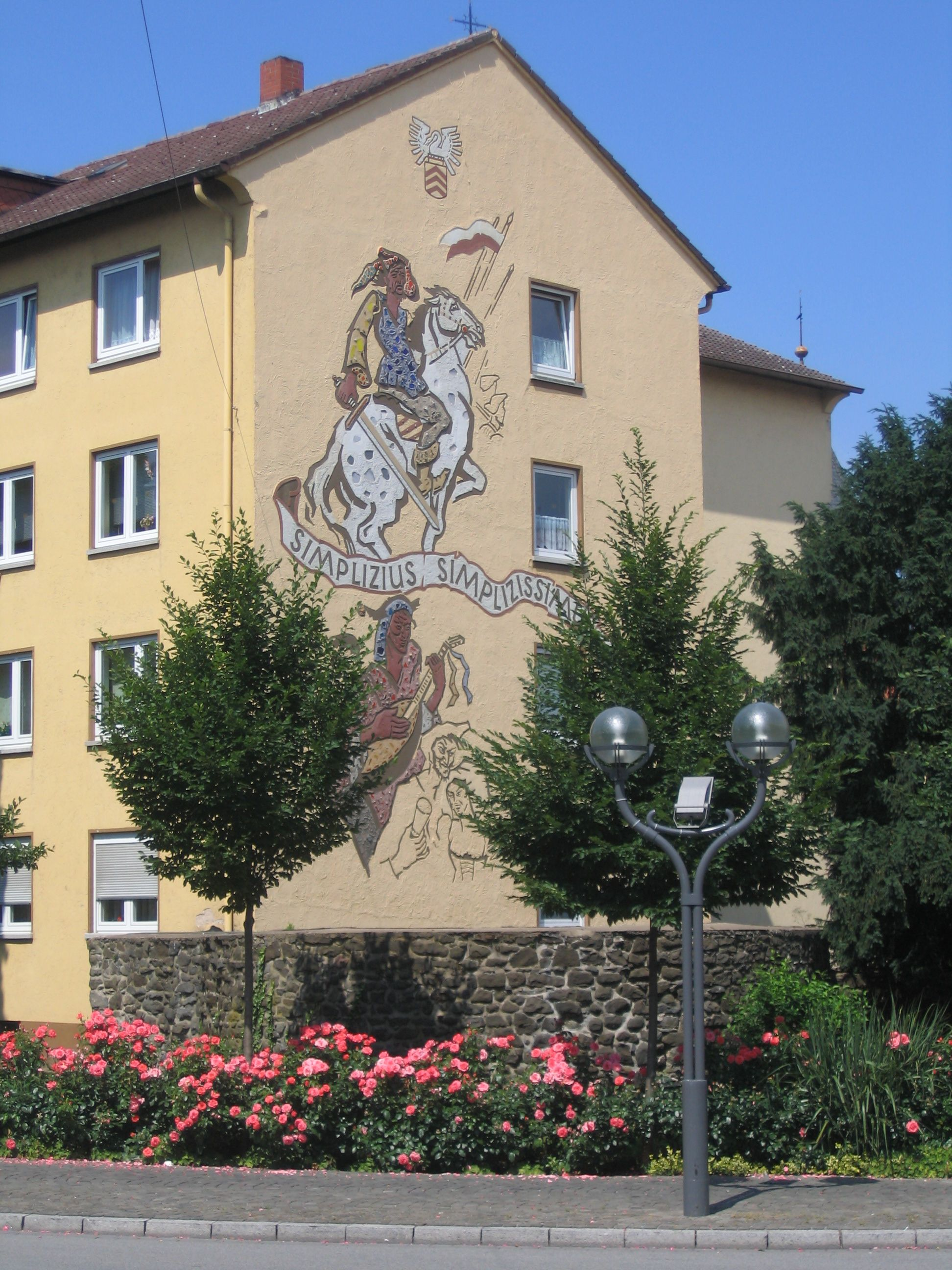 Stadtmauer (Hanau)